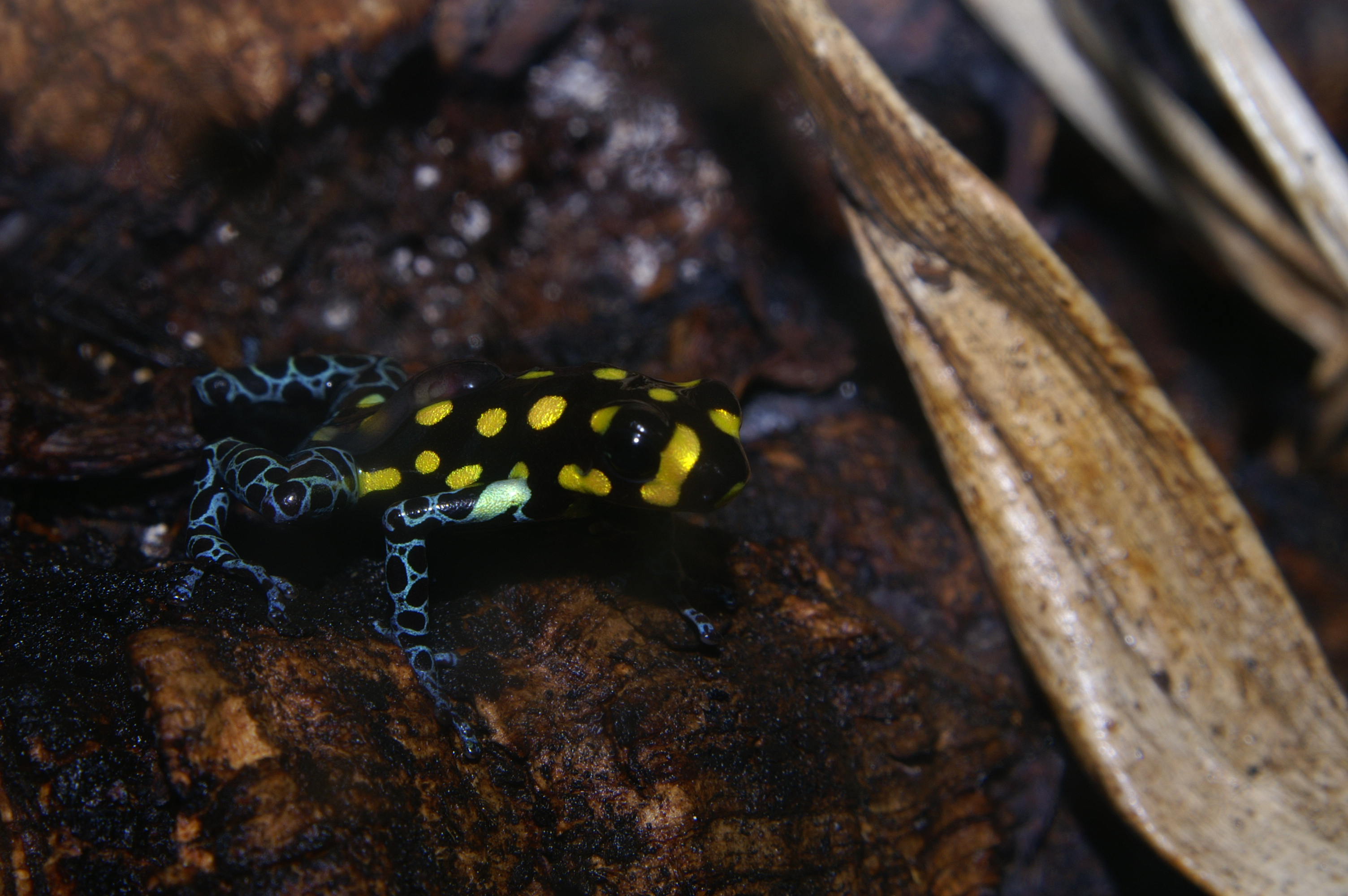 Ranitomeya née en captivité et elevée en terrarium